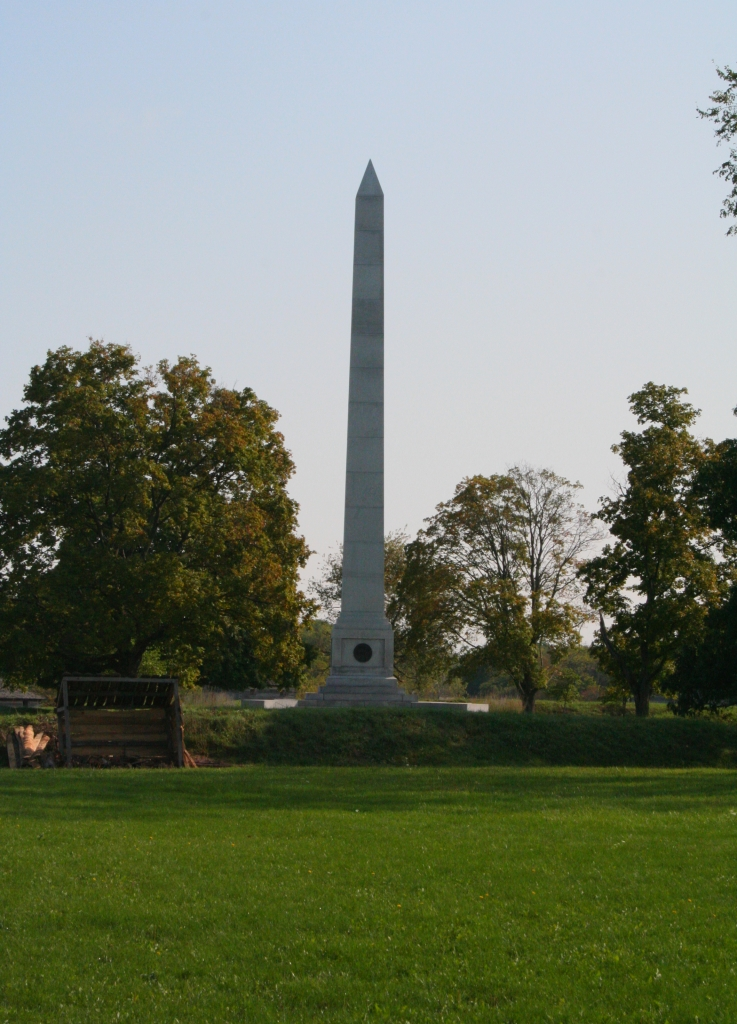 Fort Meigs